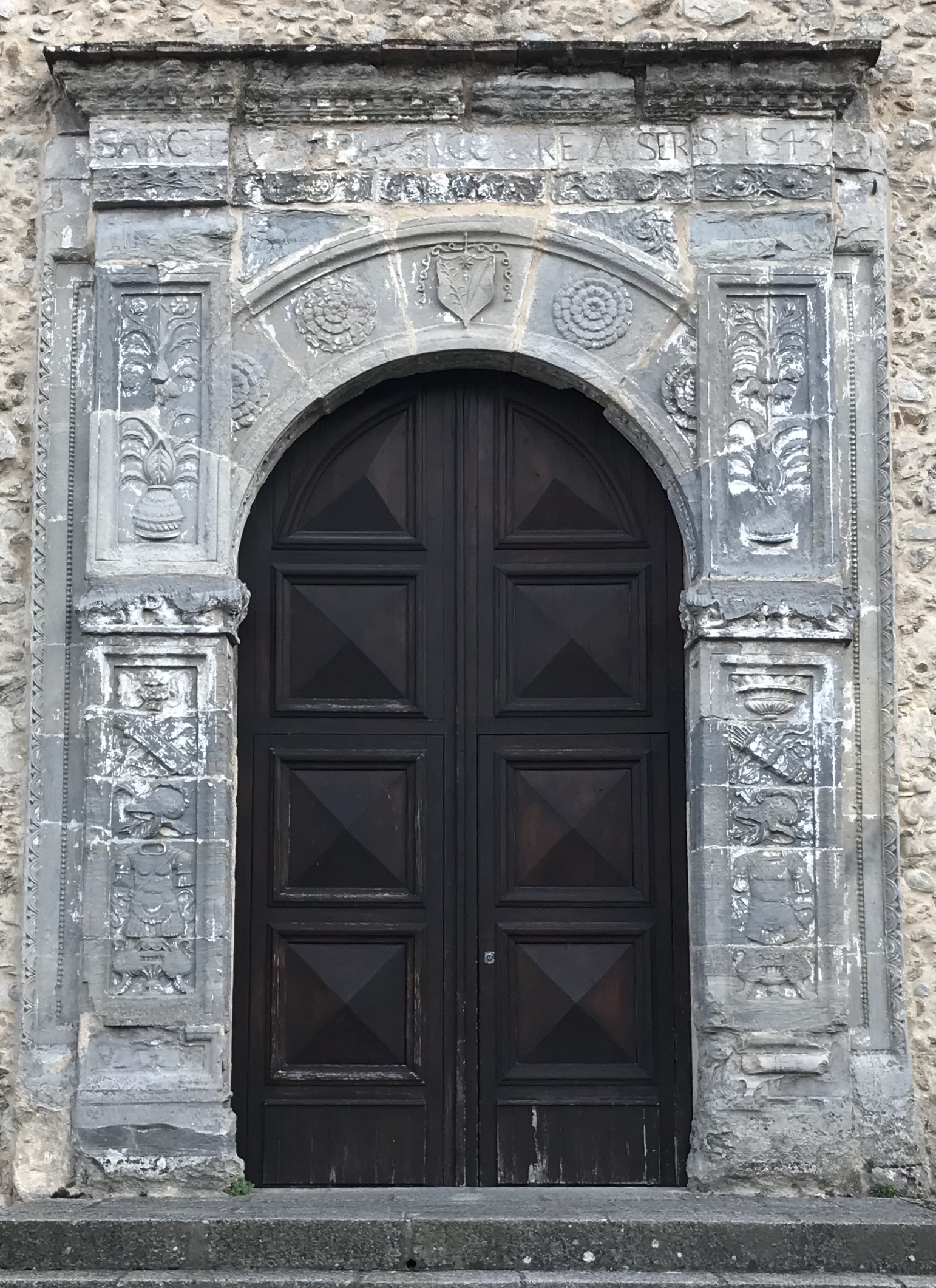 Chiesa di Santa Maria del Soccorso a Caccuri